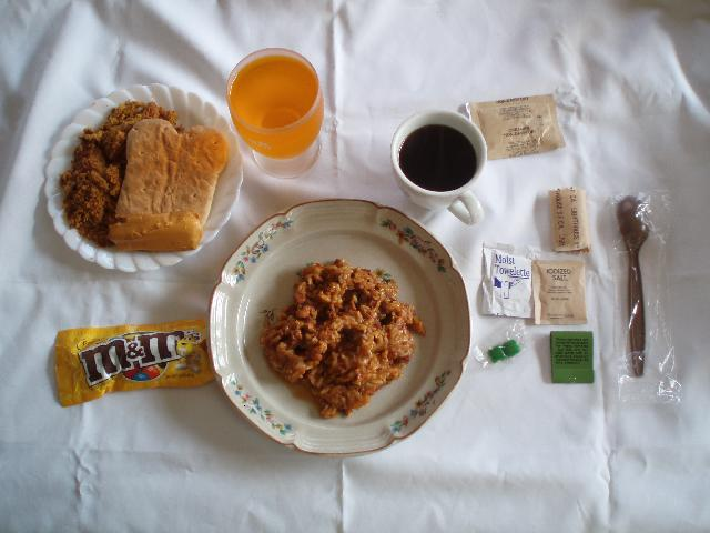 MRE Menu.22 JAMBALAYA